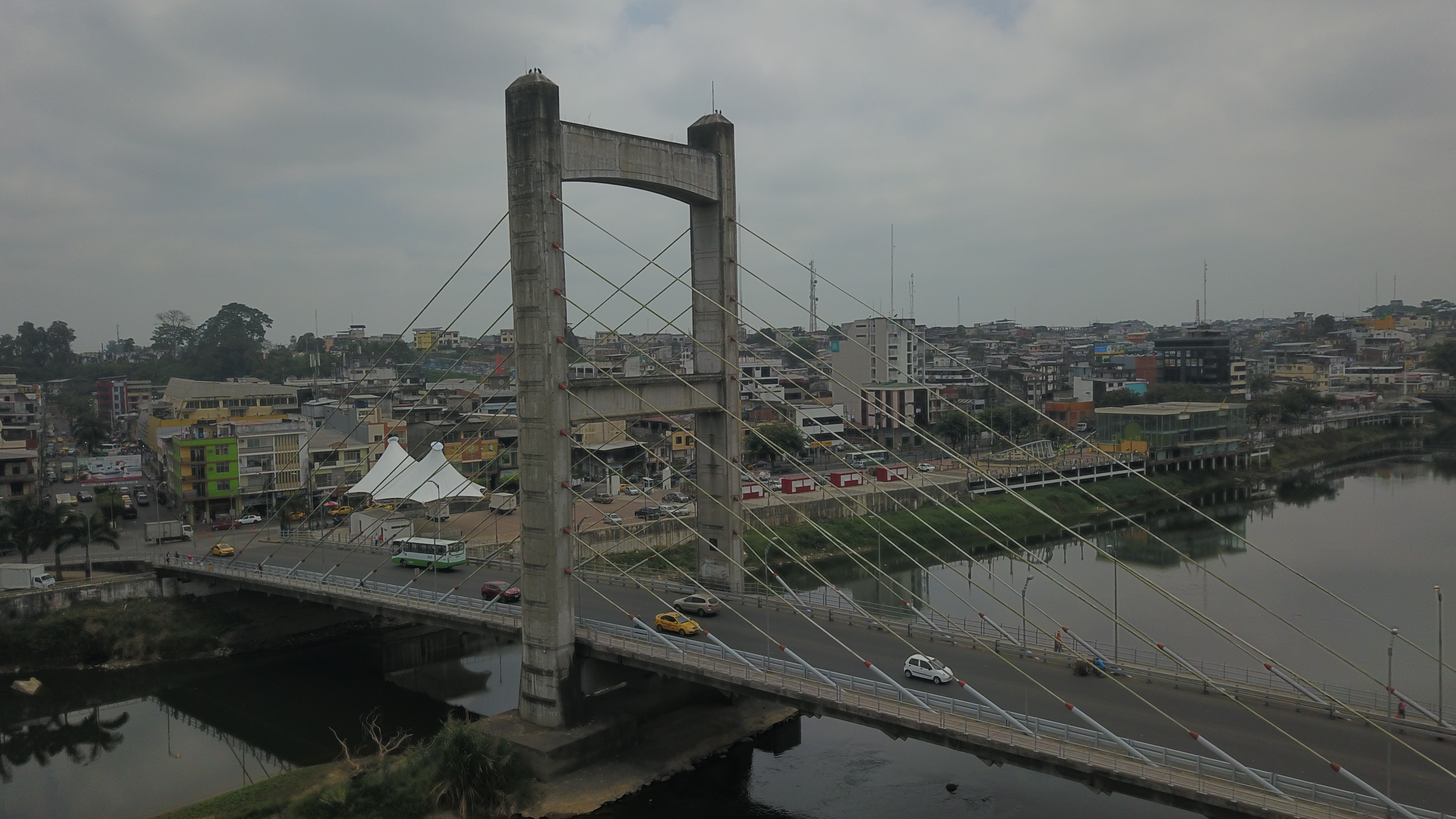 crazy